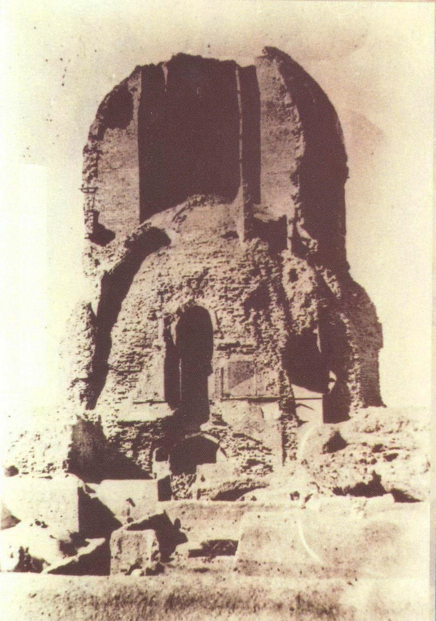 گنبد سبز کرمان